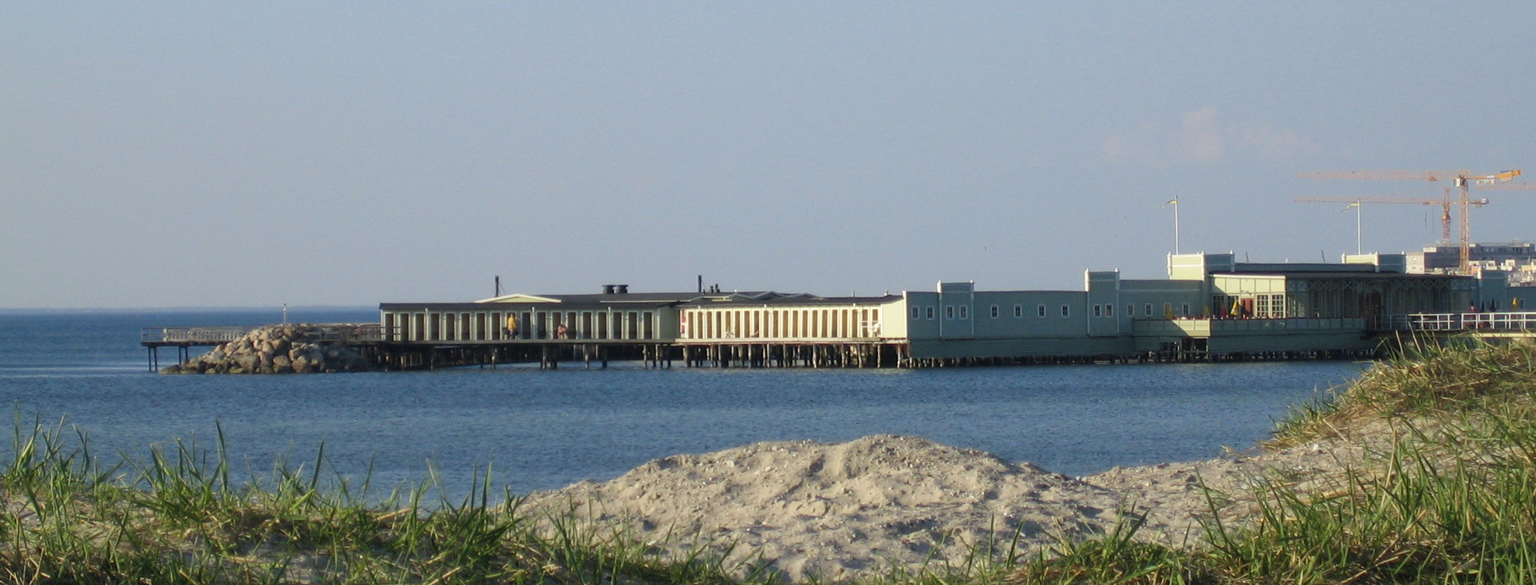 Ribersborgs kallbadhus in Malmö, Sweden.